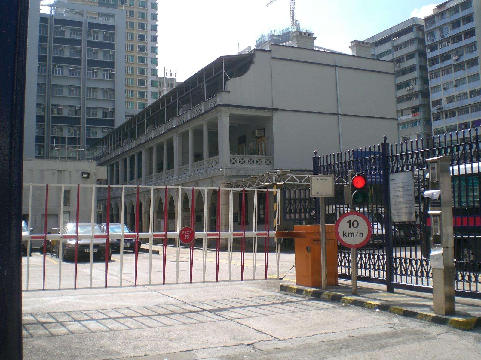 位於彌敦道近太子站旺角警署停車場入口, Nathan Road, Kowloon, Hong Kong.